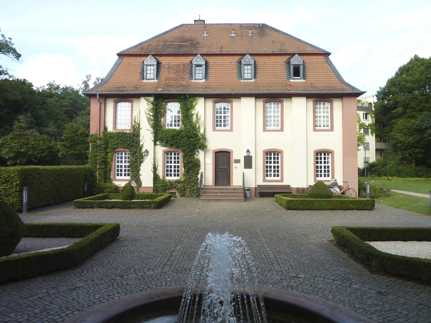 Neu-Isenburg bei Frankfurt am Main, Hessen: Die Bansamühle war eine im Jahr 1705 am Königsbach/Luderbach errichtete Wassermühle mit dazugehörigem barockem Wohnhaus. Die Mühle erhielt ihren Namen nach der Frankfurter Bankiersfamilie Bansa, die das Anwesen im Jahr 1766 aufgekauft hatte. Das Foto zeigt eine Ansicht des heute als Bansamühle bezeichneten Wohnhauses